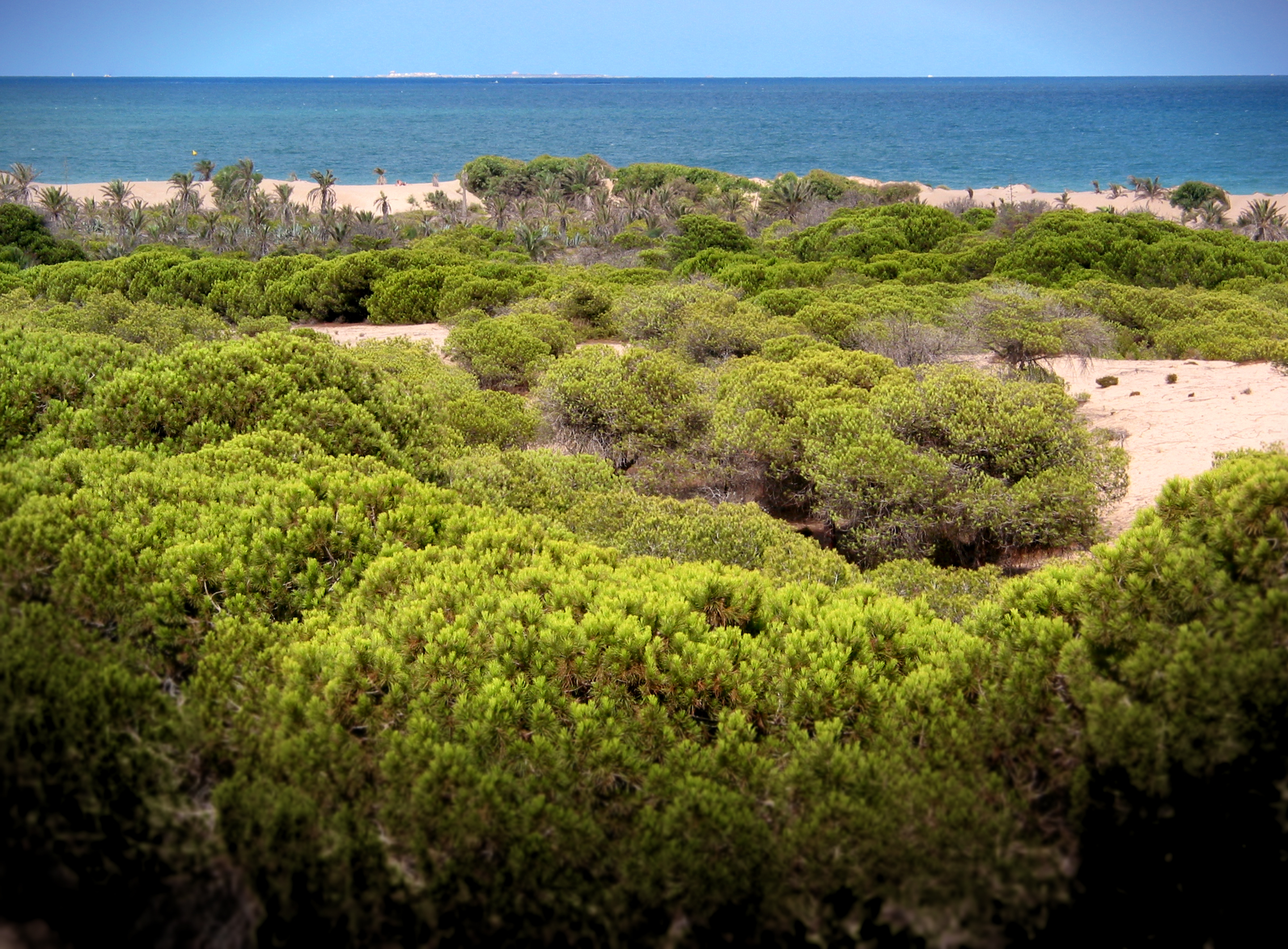 Dunas de Guardamar del Segura, España.